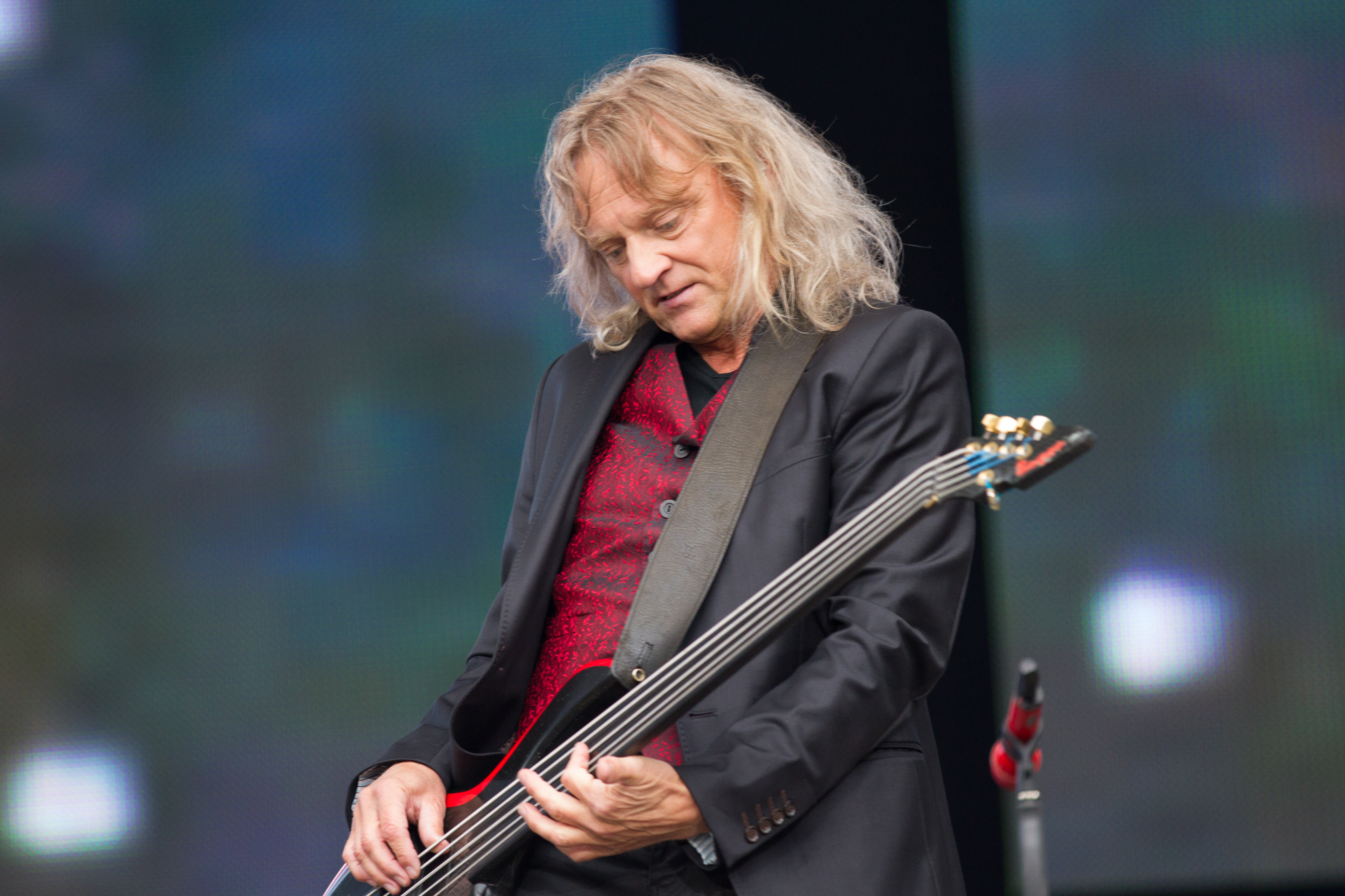 Christian Liebig von Karat beim "Karat 40 Jahre KARAT - Das EINZIGE Jubiläumskonzert" in der Berliner Waldbühne am 20.06.2015